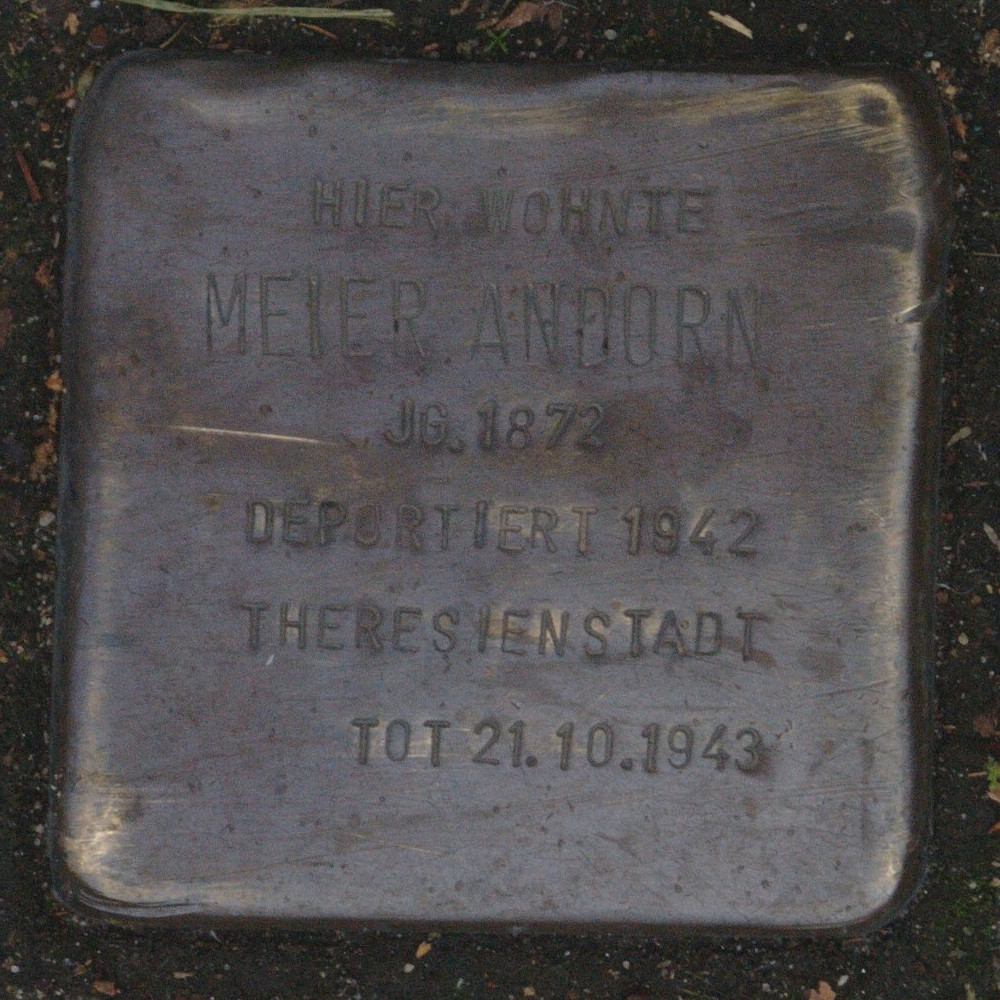 Stolperstein in Hattingen Meier Andorn